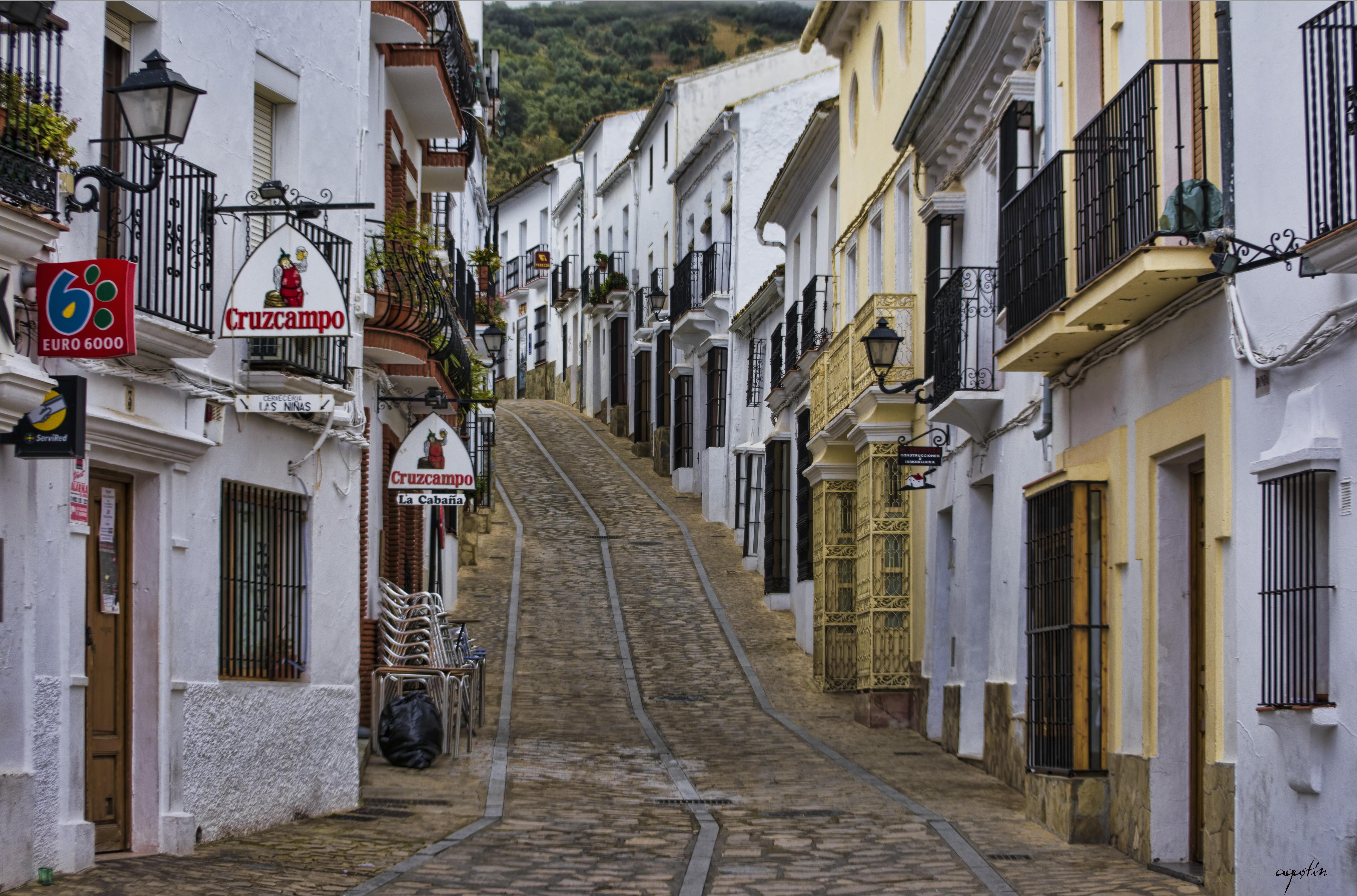 Calle en Zahara de la Sierra.